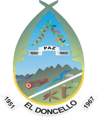 escudo de el municipio de el Doncello Caqueta Colombia